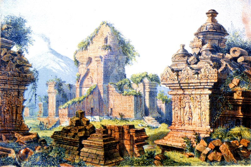 Ruines op Java